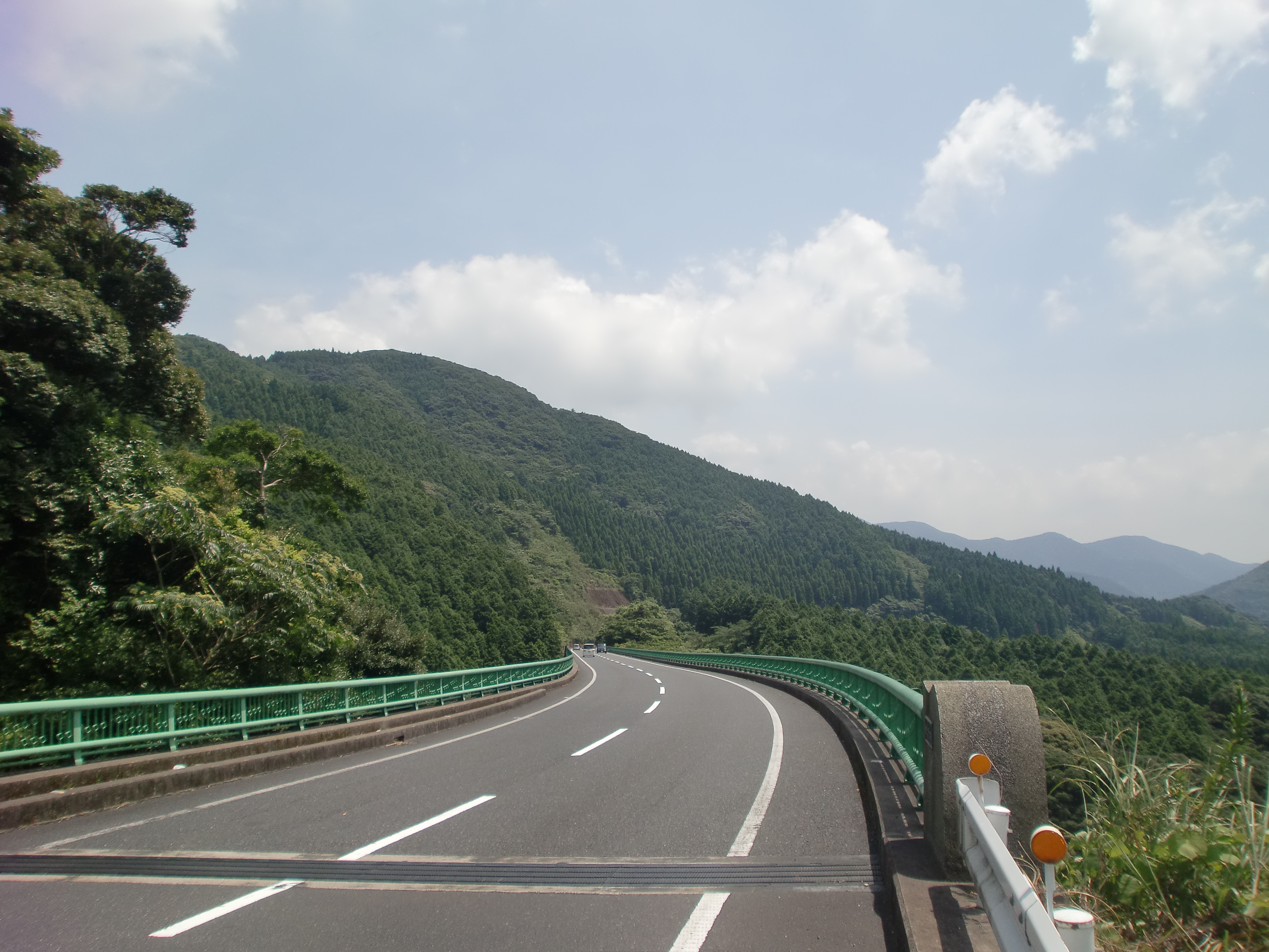 鹿児島県道19号鹿児島川辺線の鹿児島市錫山附近から南九州市川辺方面を望む。当道路は南薩縦貫道の当面活用区間として使用されている。